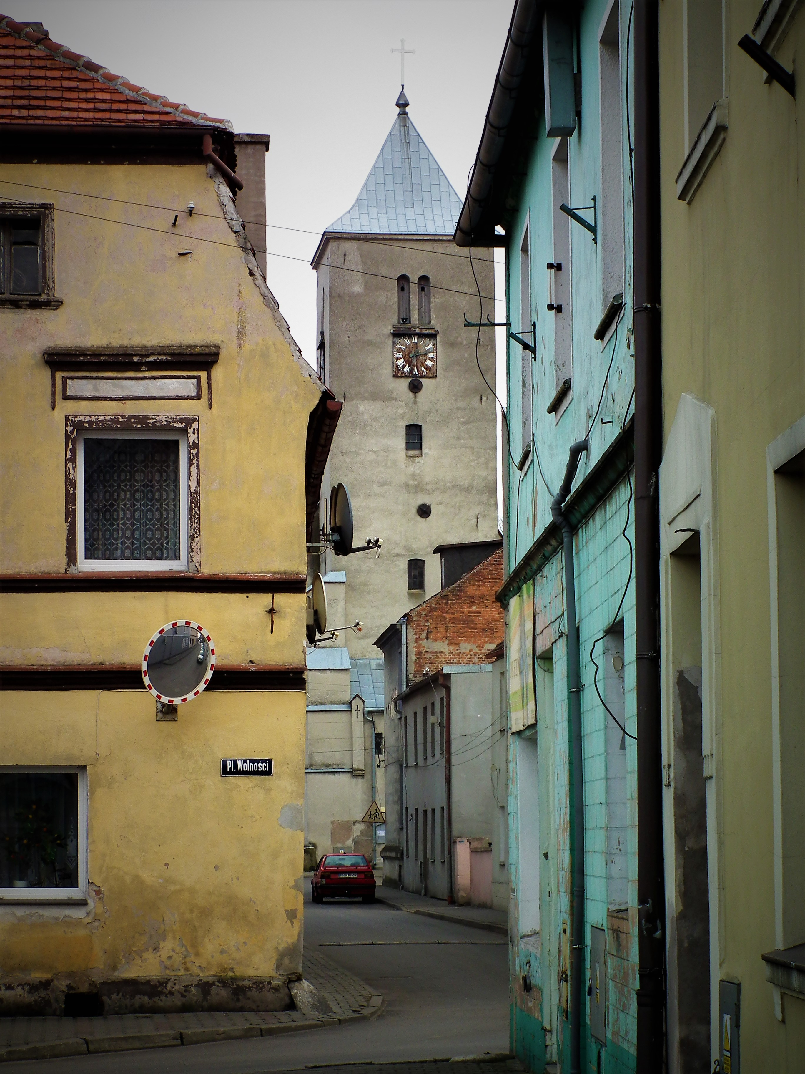 Impresja miejska z Wąsosza.